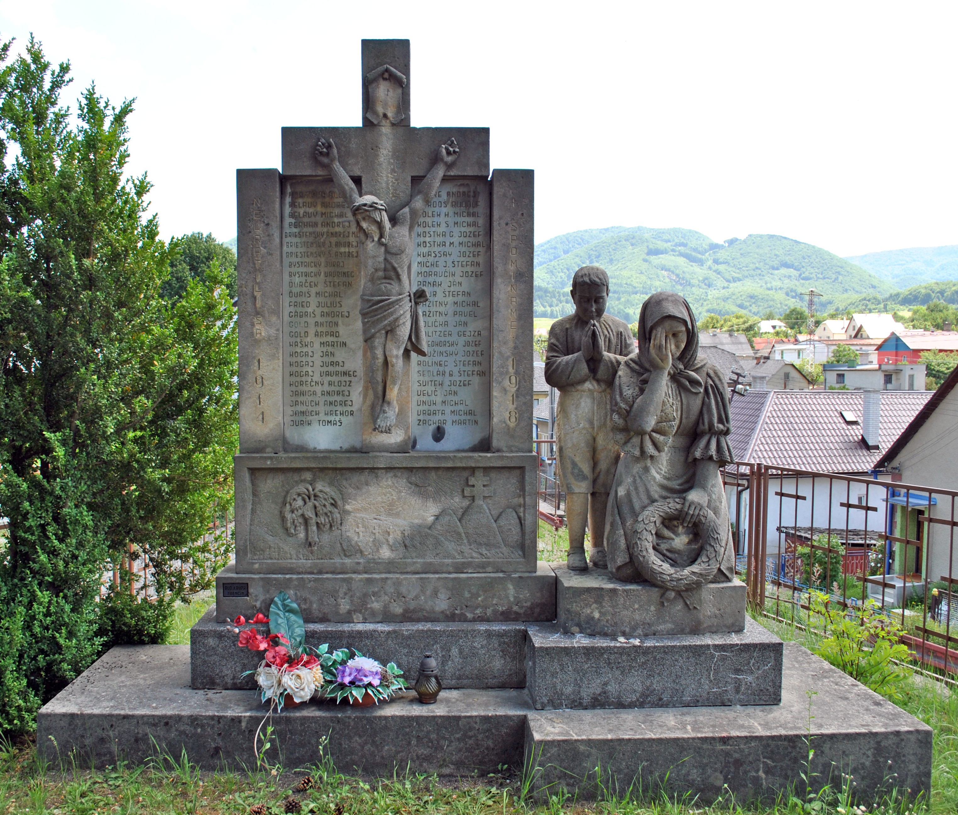 Pomník padlých v I. a v II. sv. vojne z roku 1937